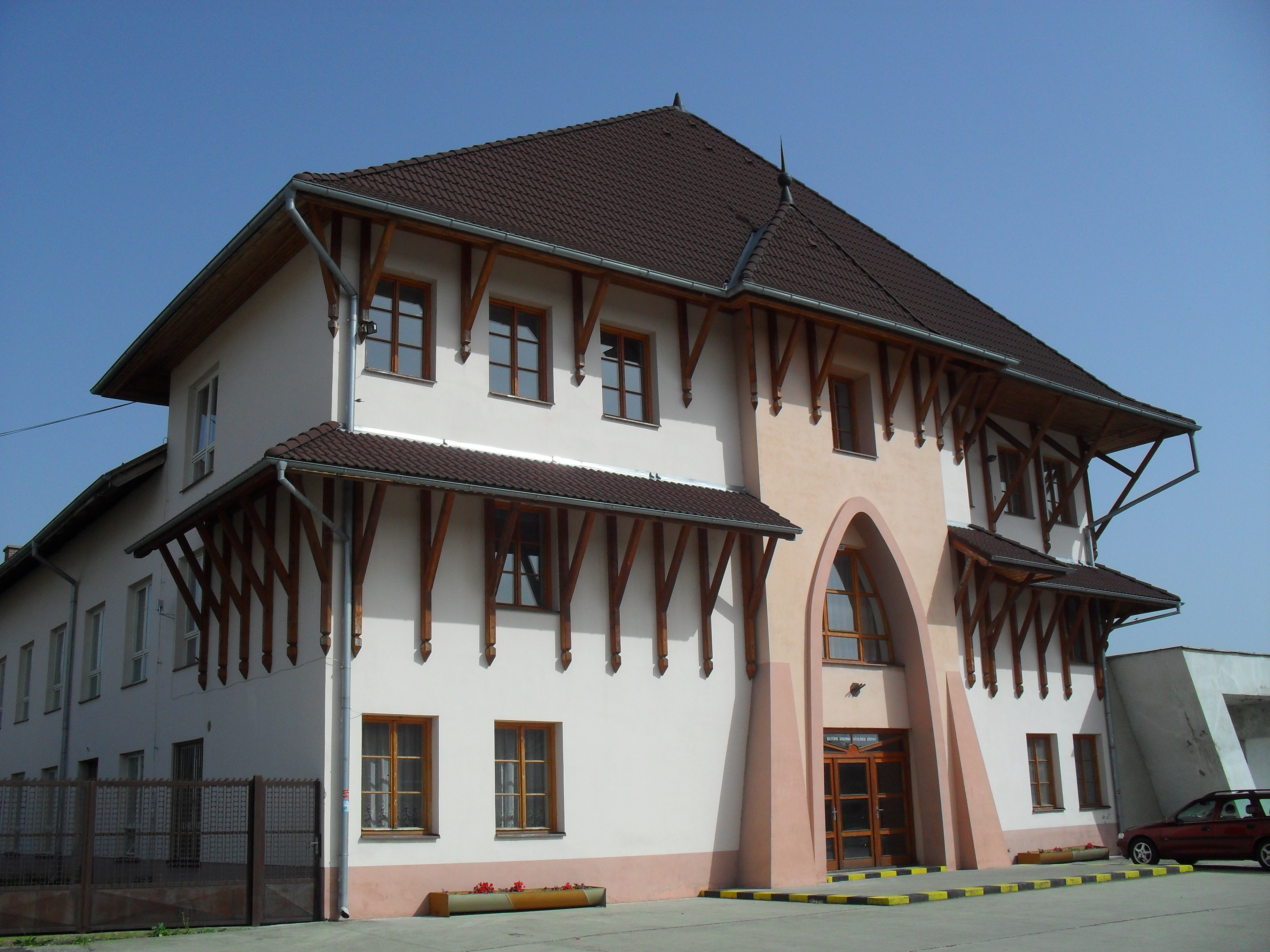 Marcelháza - kultúrház